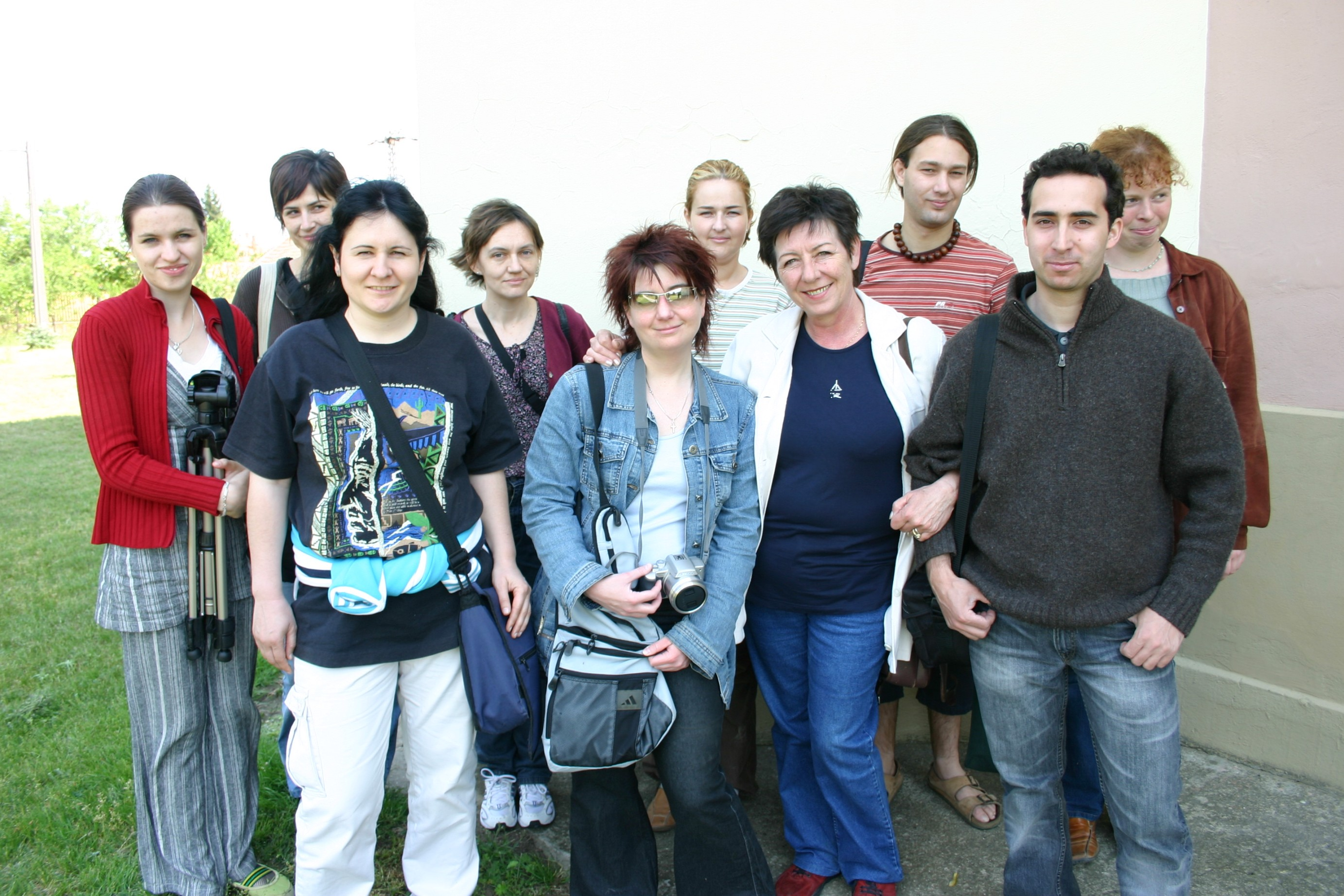 Hamza Studio 2006, Jászszentandrás